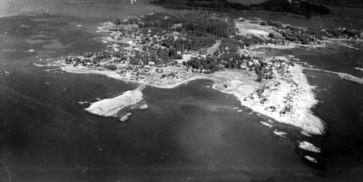 Lindøya sett mot nord-øst, 1938